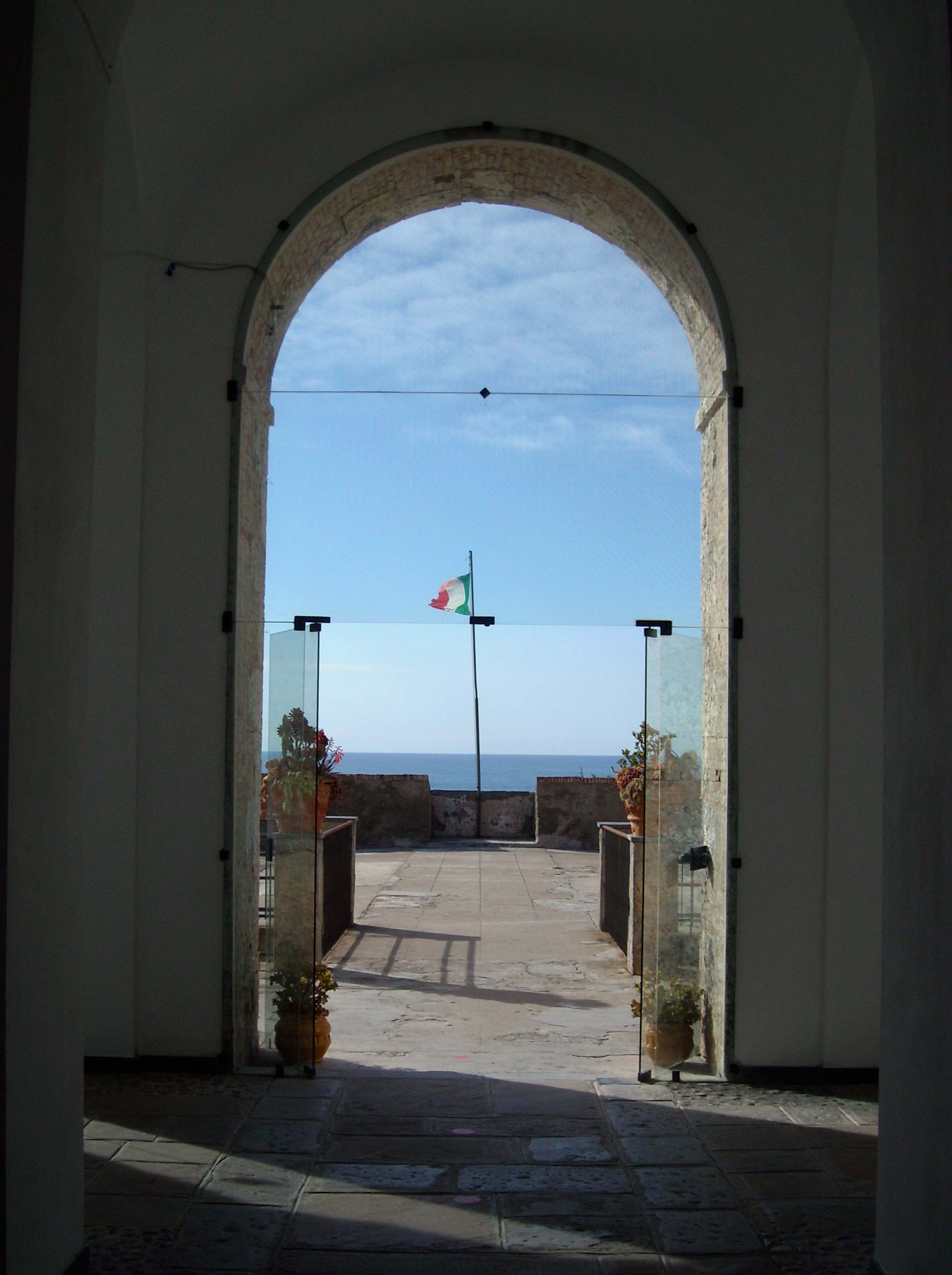 Entrata della Fortezza dell'Annunziata a Ventimiglia, Liguria, Italia.